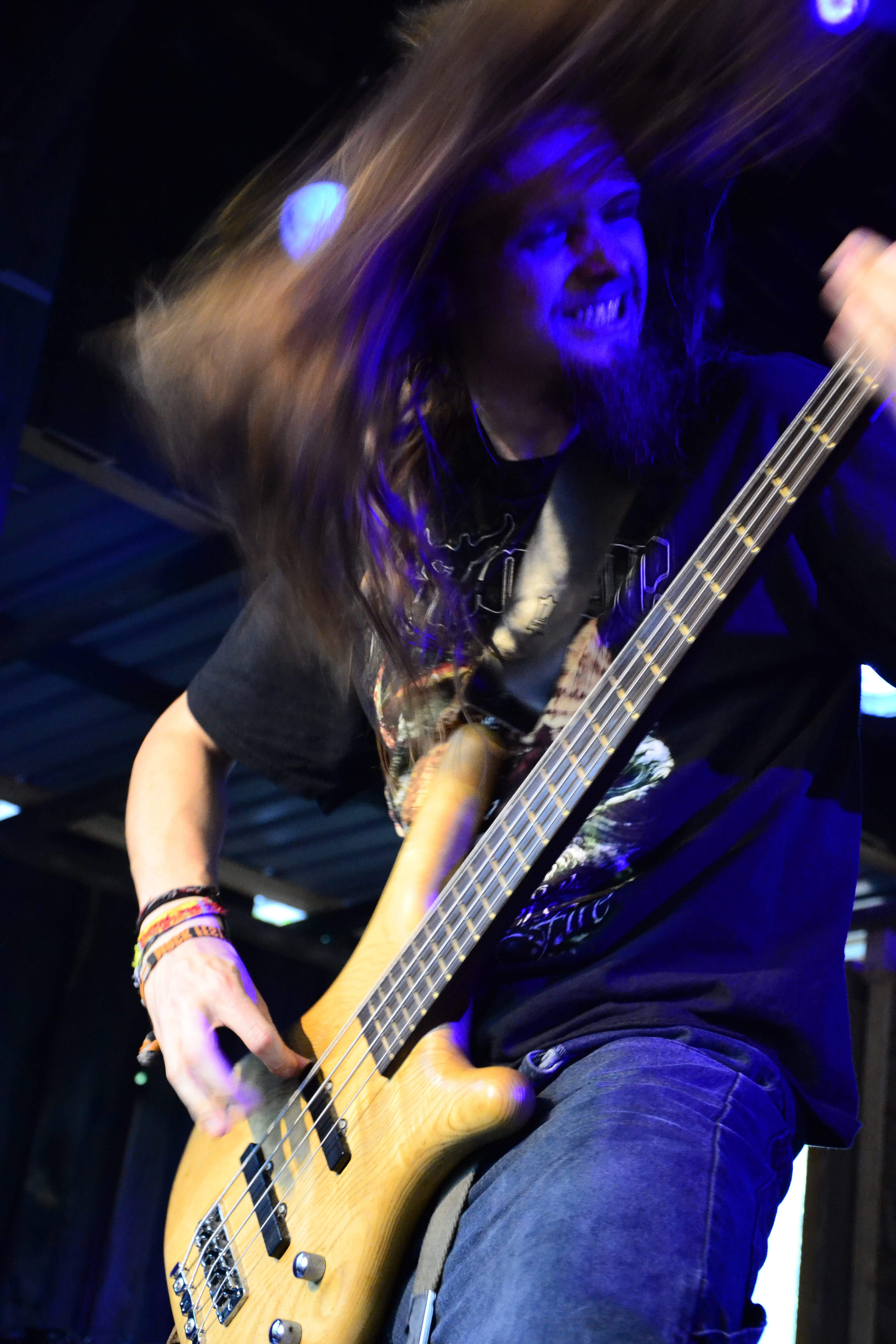 Paul MacKenzie von Xentrix beim Headbangers Open Air 2014